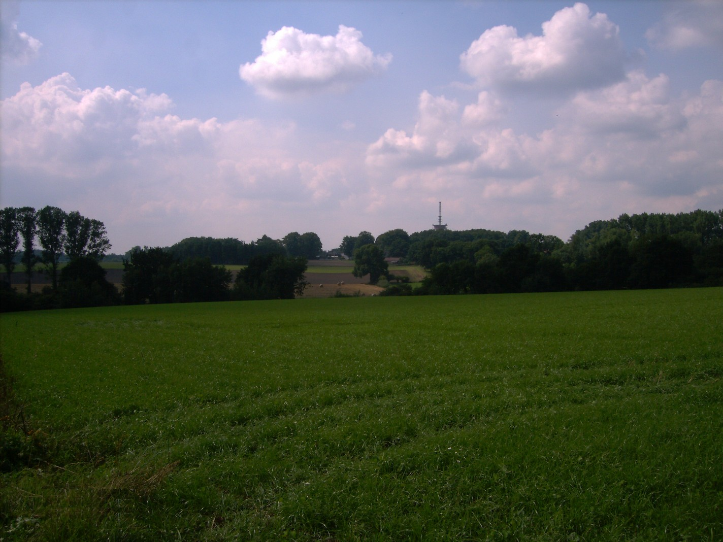 Osterholzer Geest in der Gemeinde Vollersode